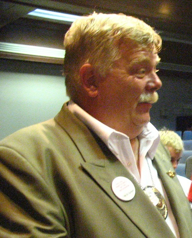 Basil Marceaux